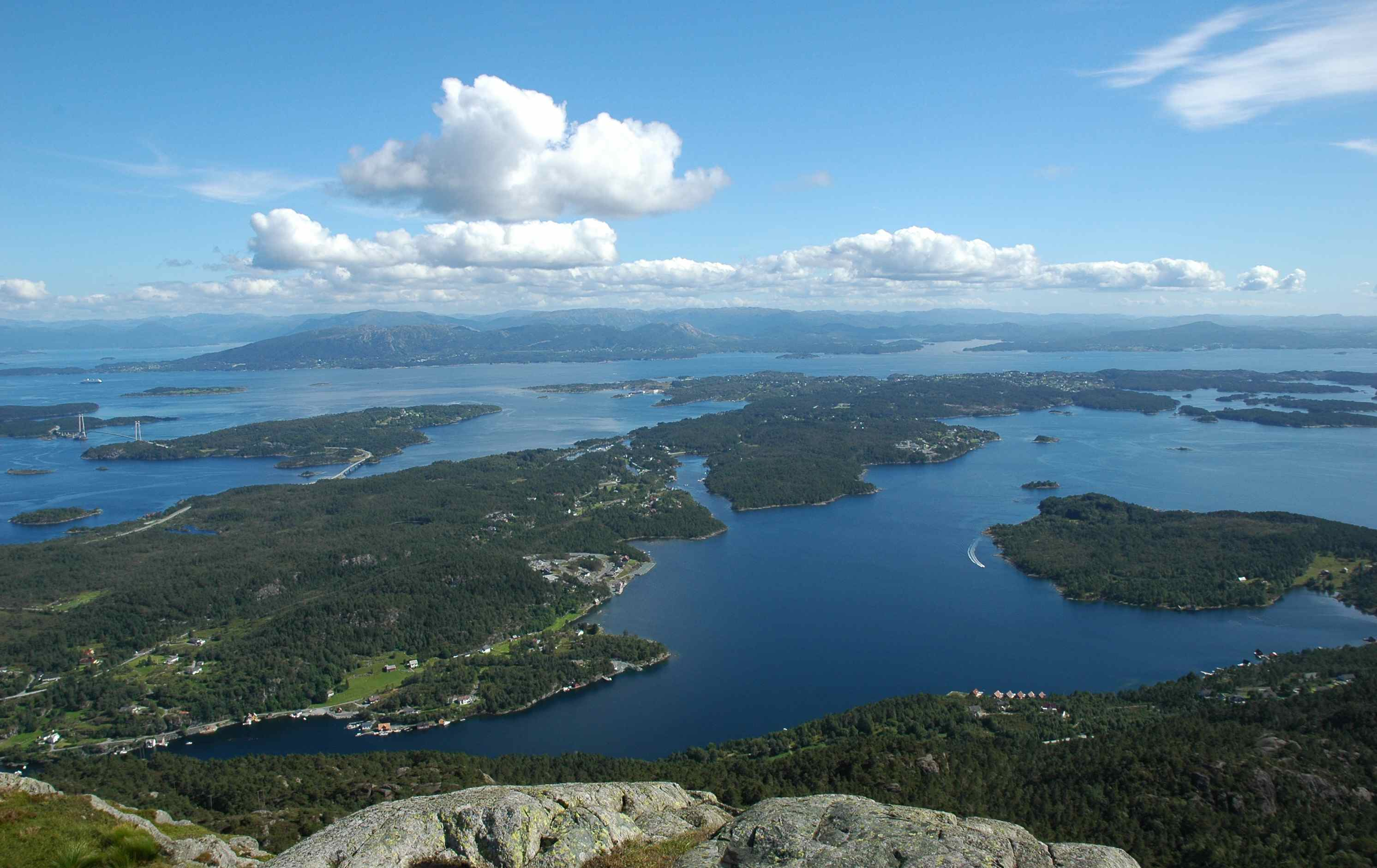 Utsikt fra Siggjo mot Røyksundkanalen og Moster. I nord sees Trekantsambandet med Spissøy og hengebru til Føyno.